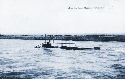 Le sous-marin Farfadet - carte postale ancienne - A Bougault ca 1905